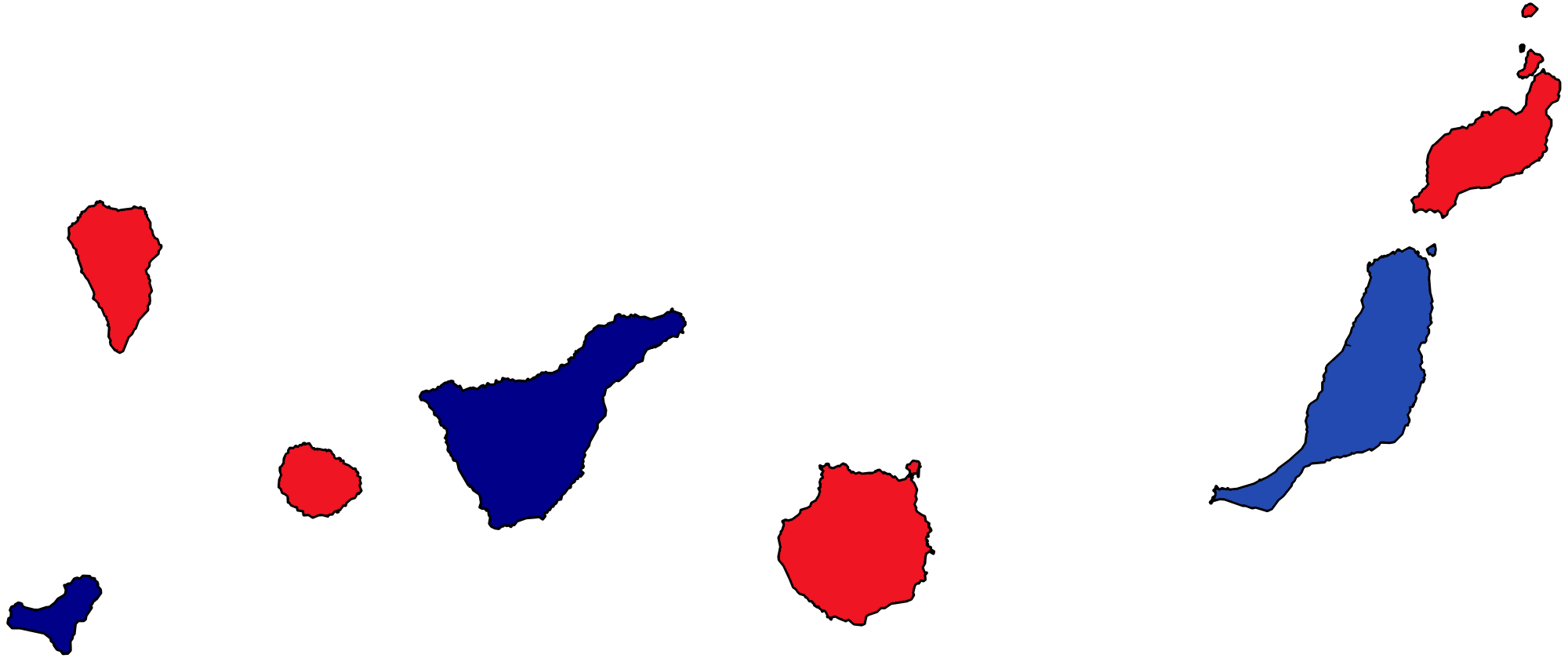 Partido más votado por circunscripción en las elecciones autonómicas de las Islas Canarias en 1987. Agrupaciones Independientes de Canarias (AIC) / Canarian Independent Groups Partido Socialista Obrero Español (PSOE) / Spanish Socialist Workers' Party Asamblea Majorera (AM) / Majorera Assembly